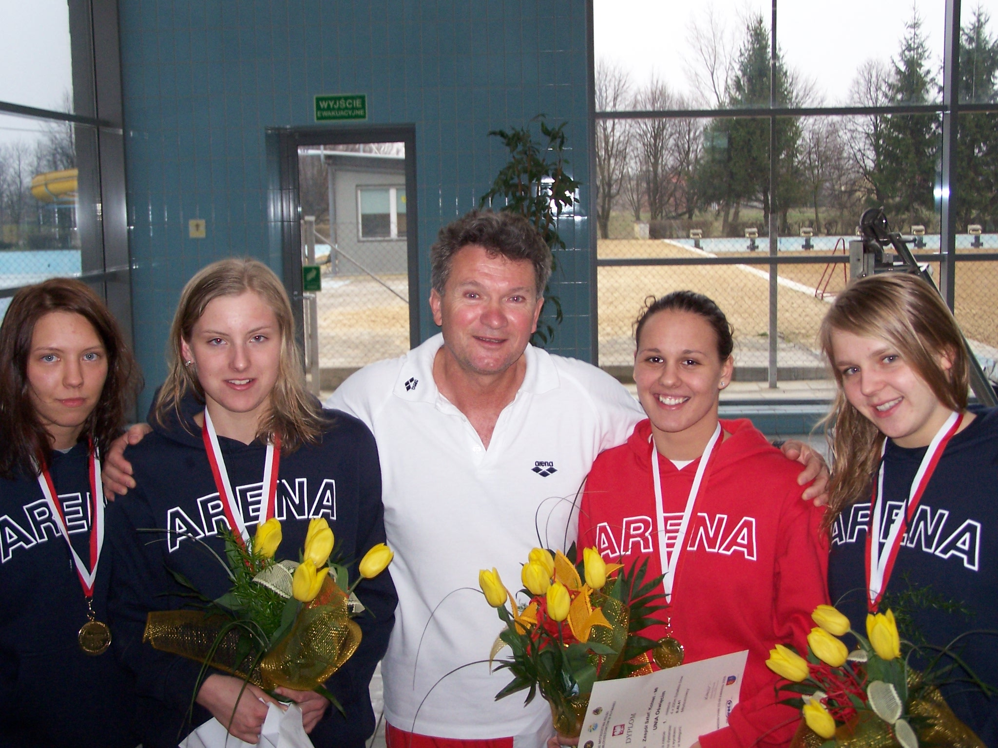 Złota sztafeta MPS 2008 Unii Oświęcim